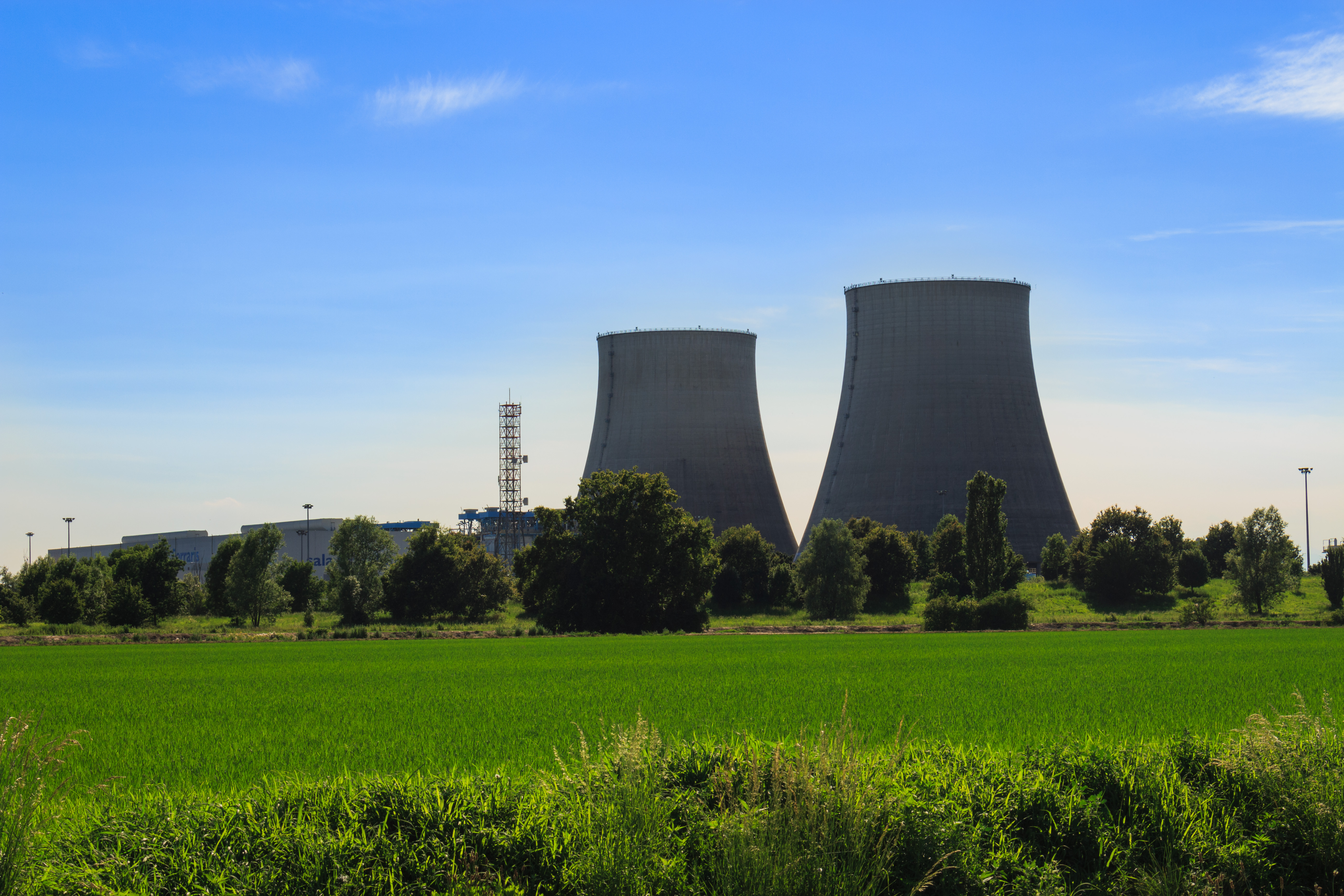 Ex centrale termoelettrica Enel "Galileo Ferraris" di Leri Cavour